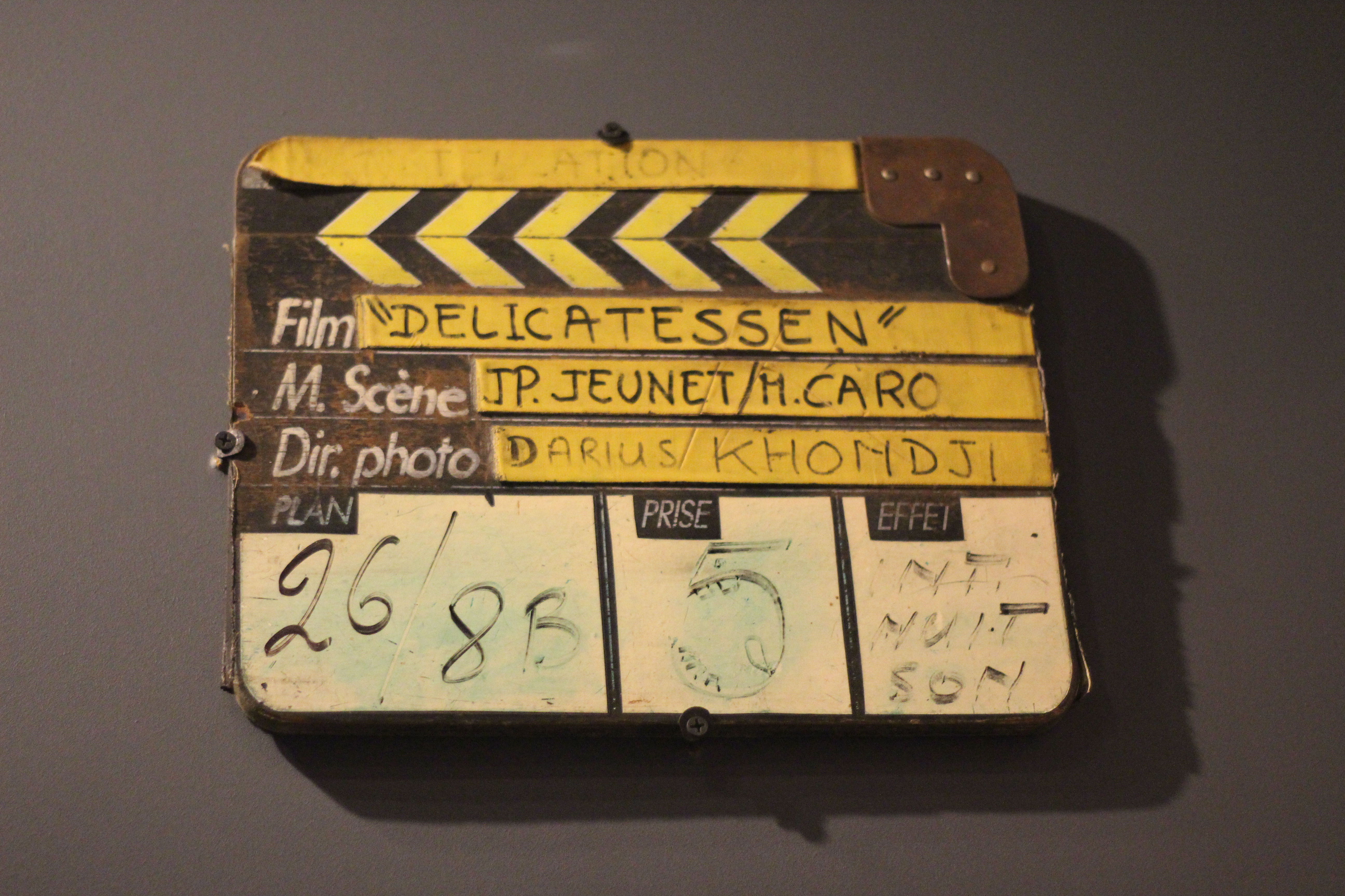 Uniforme du Docteur Livingstone, le singe savant du film Delicatessen. Exposition "Caro/Jeunet" au musée Minature et Cinéma en 2018-2019.